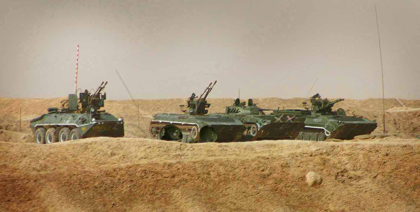 Afghanistan